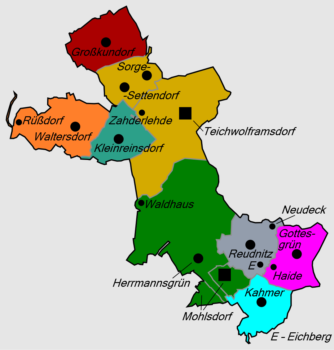 Gliederung der Gemeinde Mohlsdorf-Teichwolframsdorf ab 1. Januar 1974